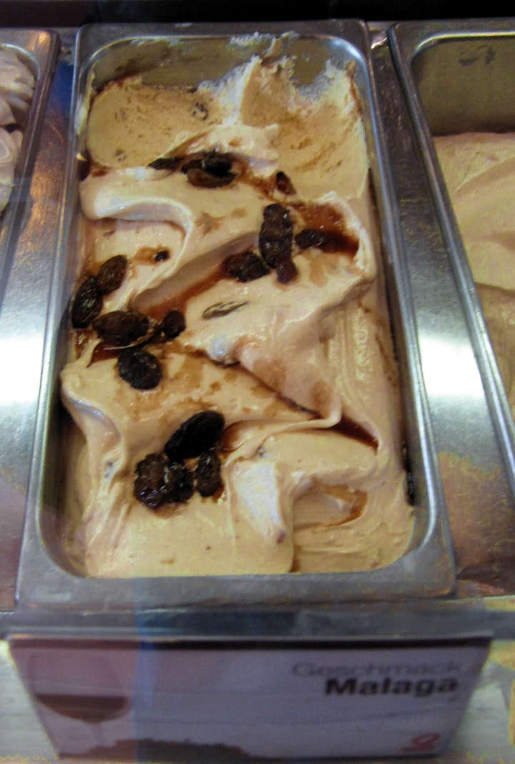 Malaga-Eiskrem